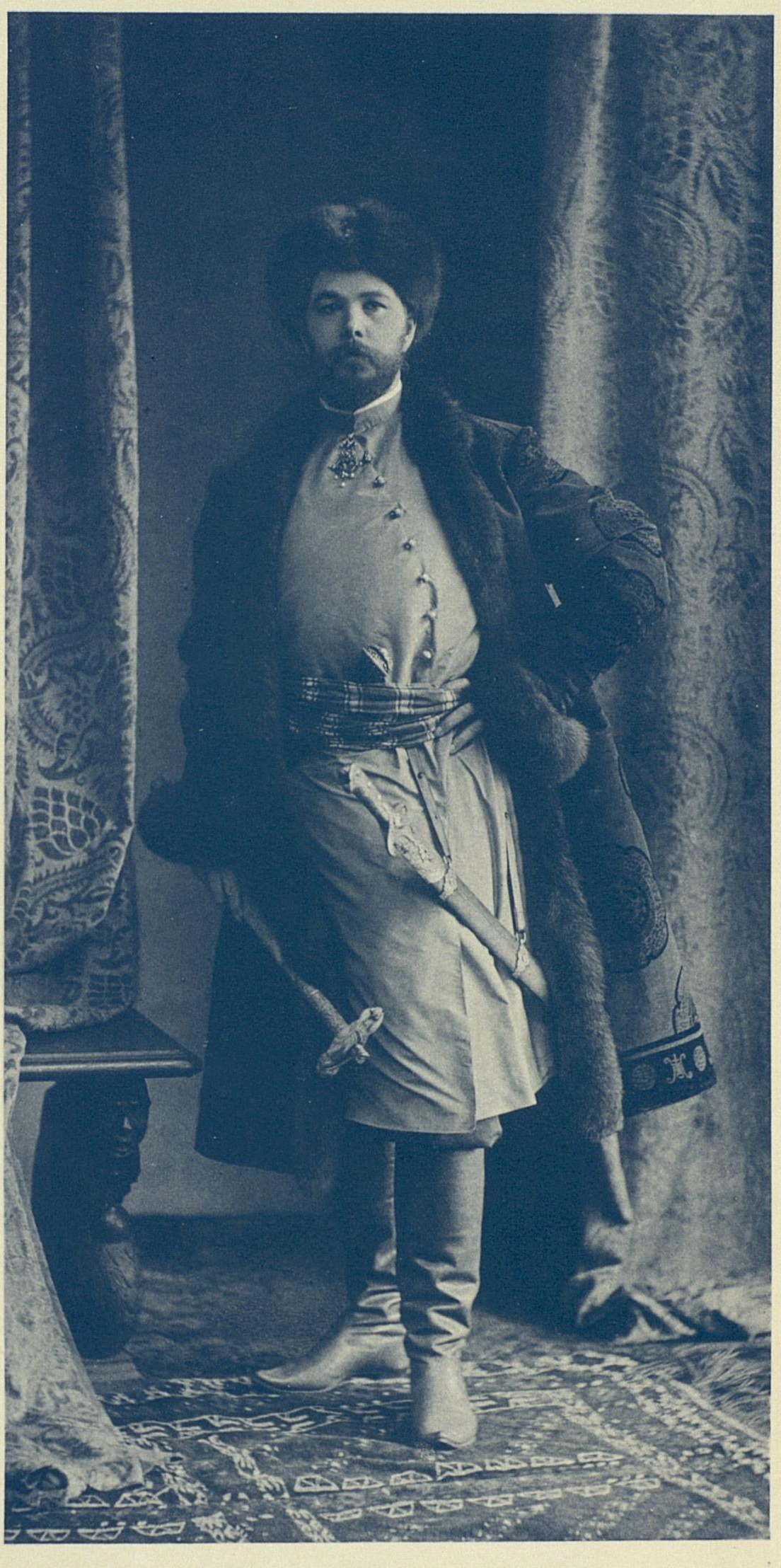 В звании камер-юнкера, Граф Павел Сергеевич Шереметьев, в одеяниях боярина XVII века.